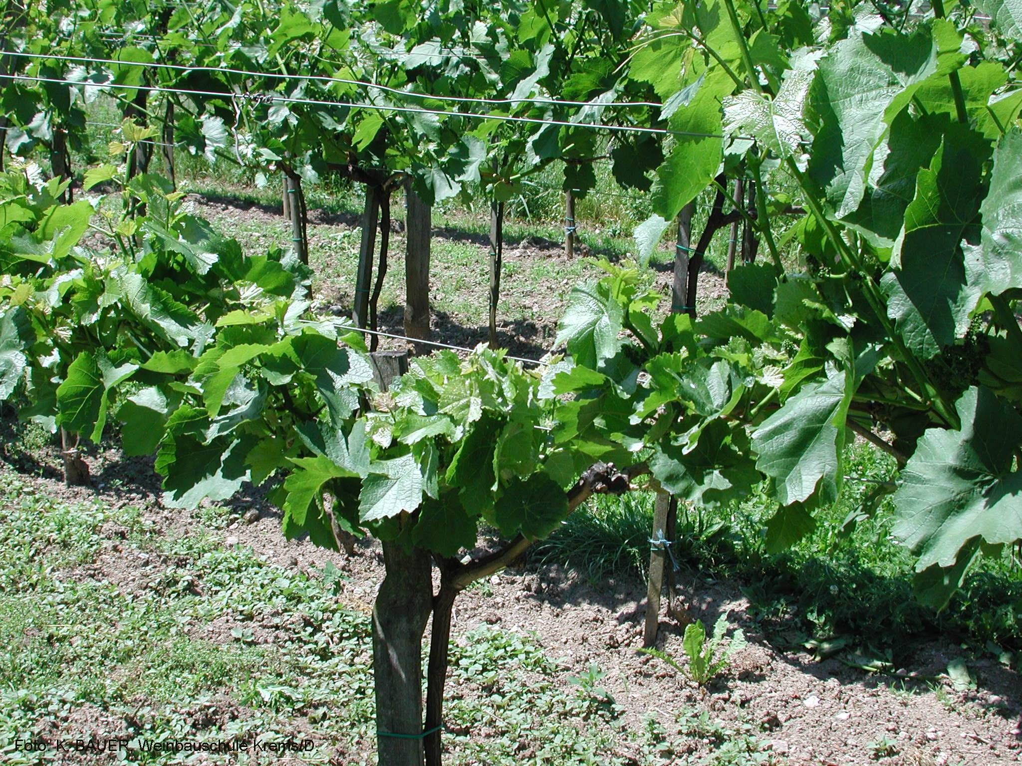 Symptome der Kurtriebigkeit bei der Sorte Neuburger